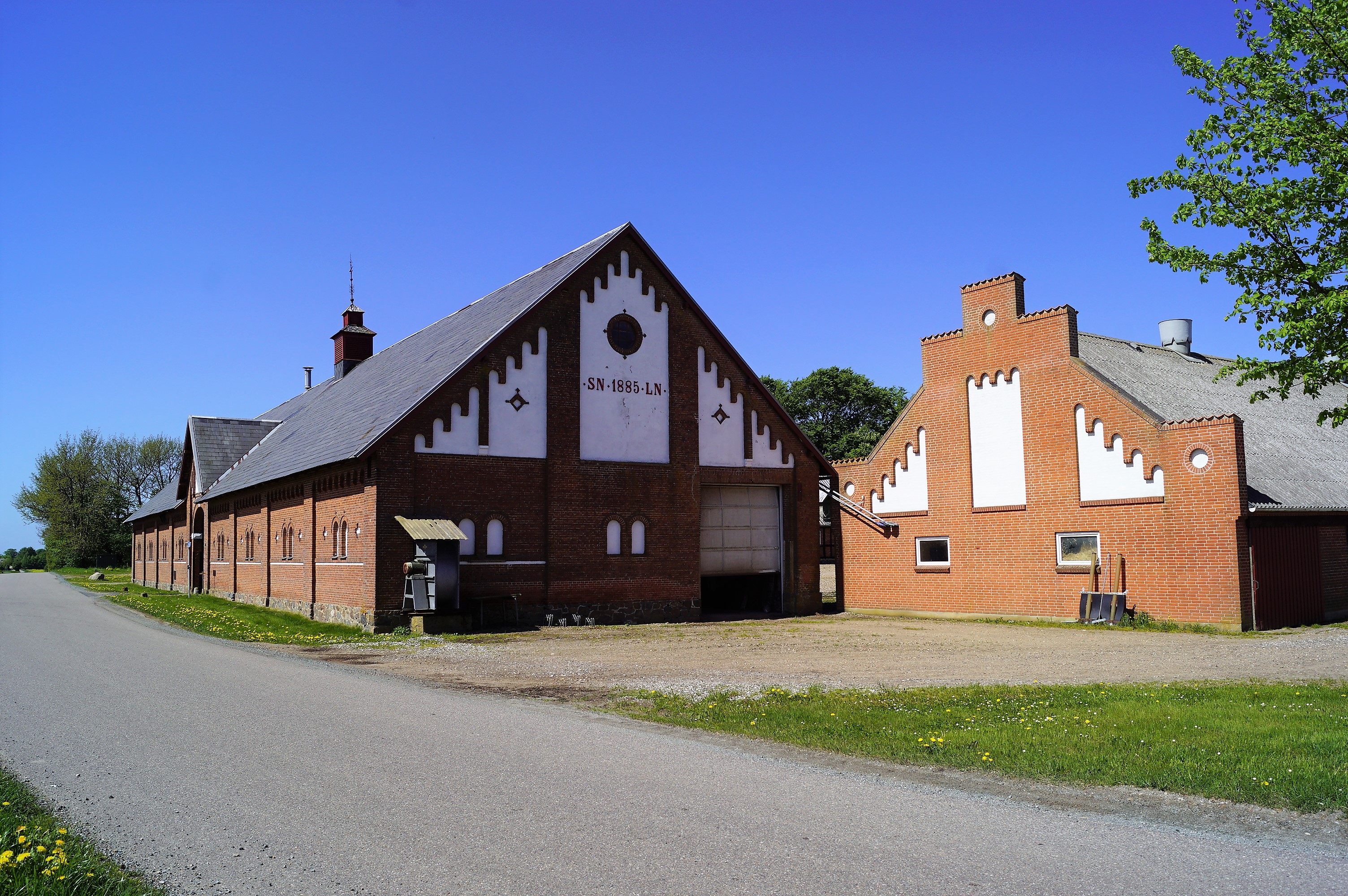 Alling Skovgård set mod vest